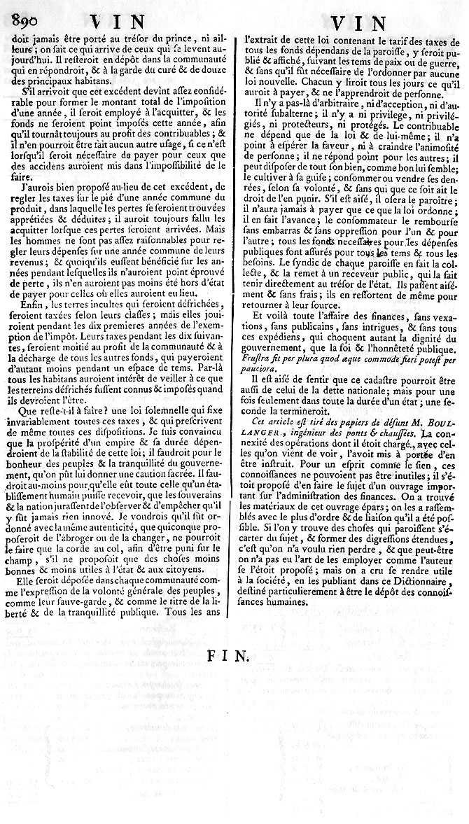 Encyclopédie, ou Dictionnaire raisonné des sciences, des arts et des métiers, volume 17.